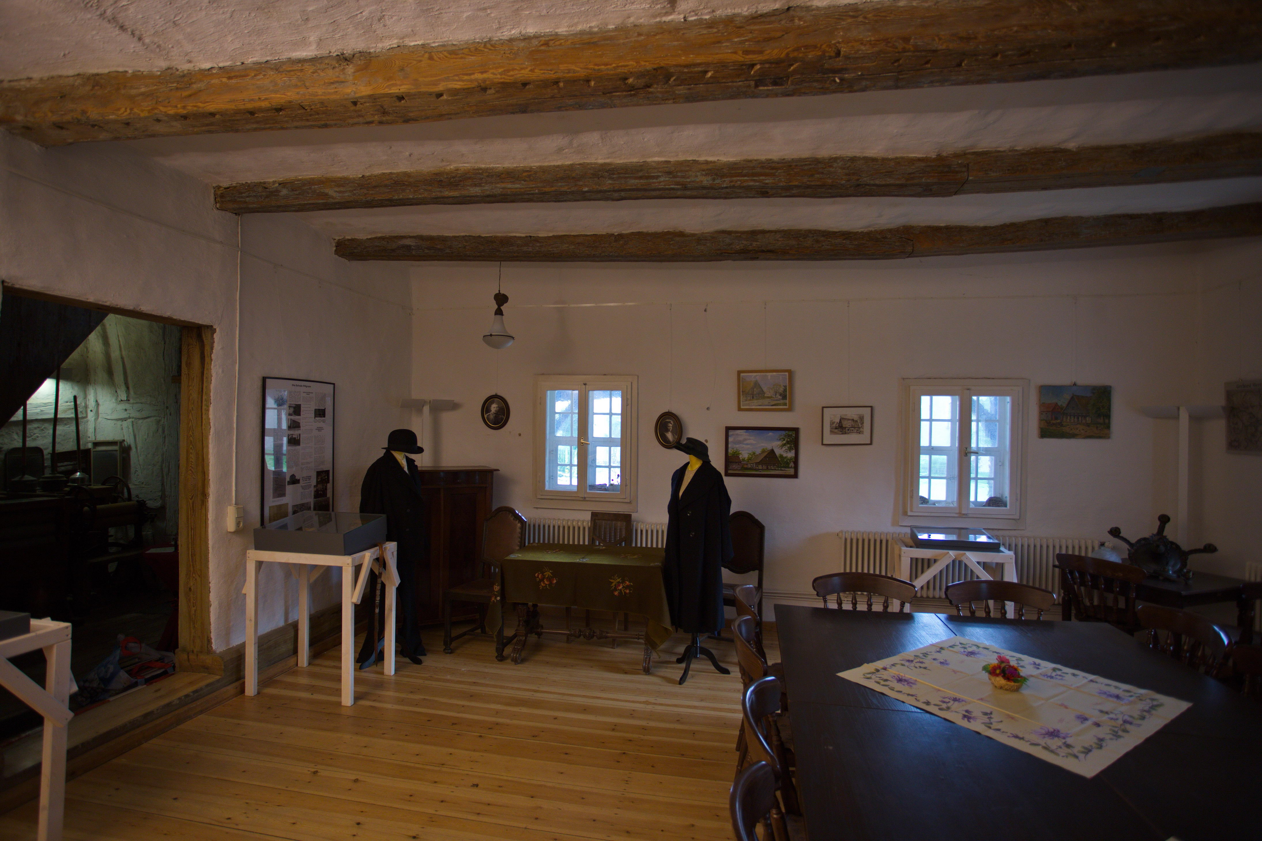 Pillgram, Biegener Straße 3 Vorgiebel-Laubenhaus, Veranstaltungsraum Denkmalliste: 09115313